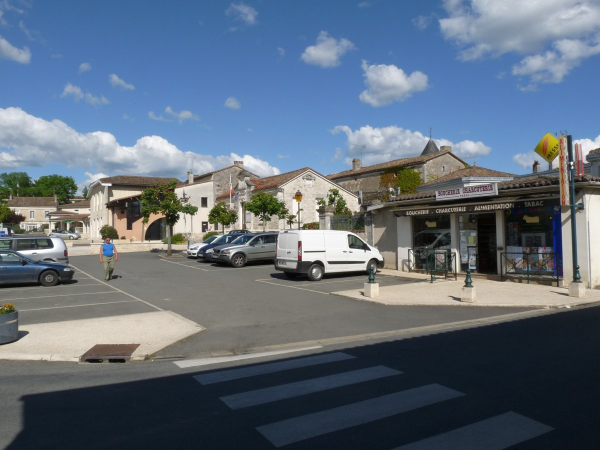 Place principale, Chazelles, Charente, France